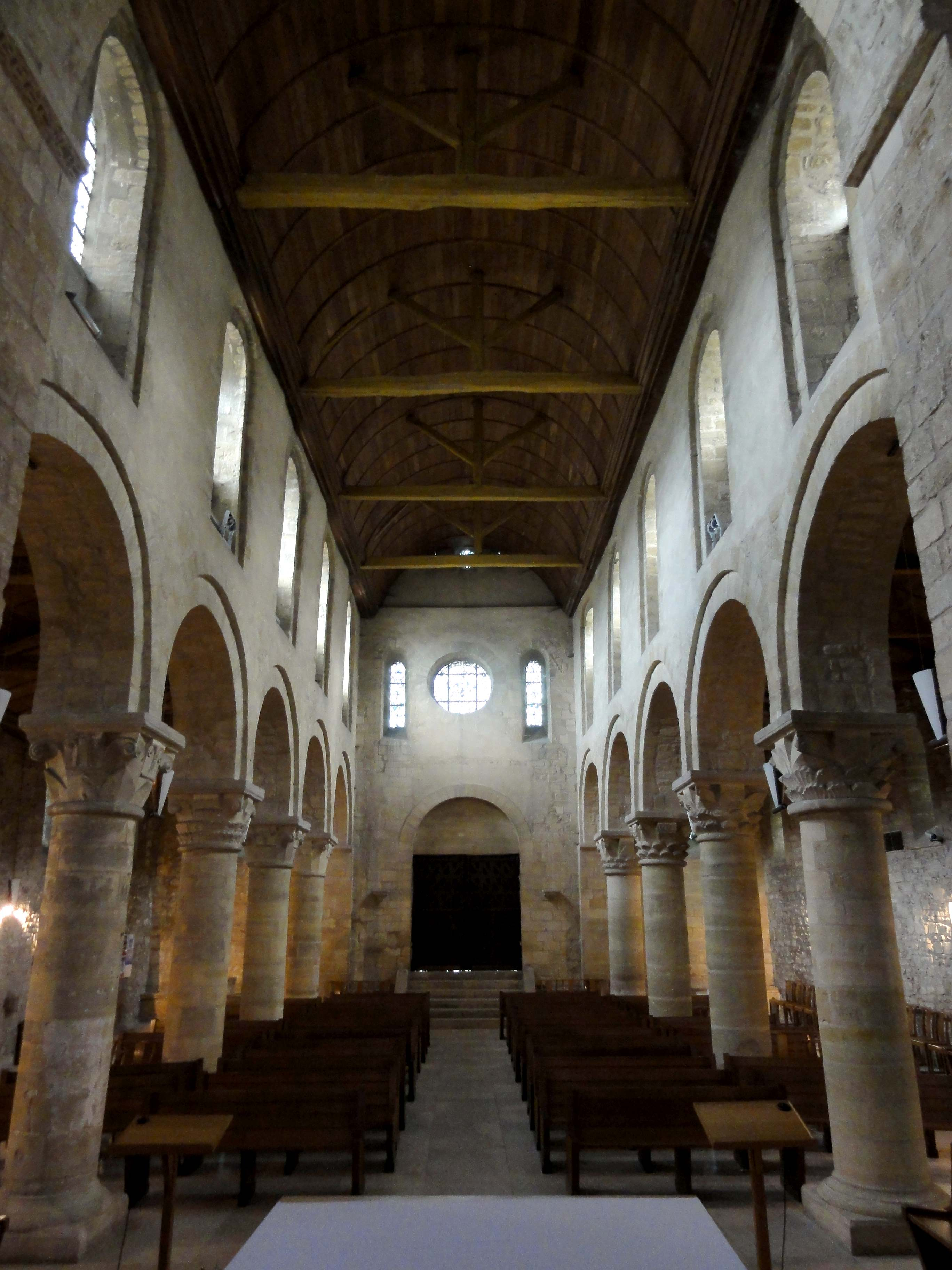 Intérieur de l'église - voir titre.